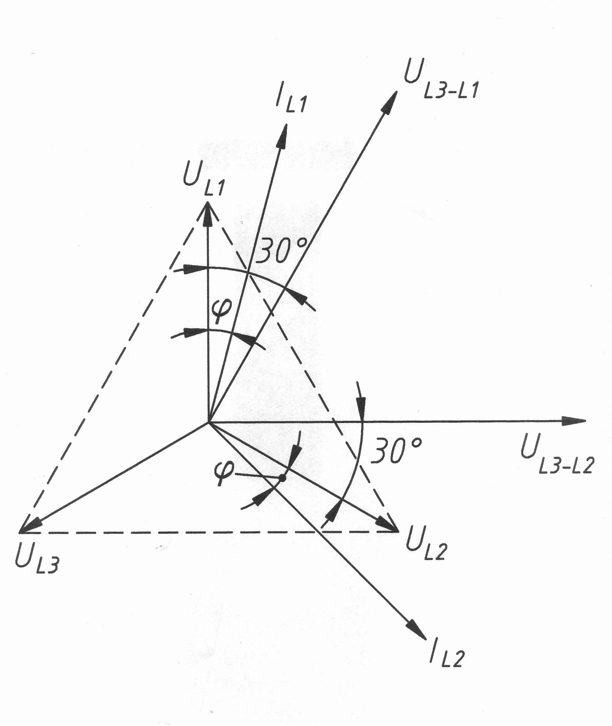 Aron kapcsolás vektorábrája háromfázisú teljesítmény mérésekor két wattmérővel.